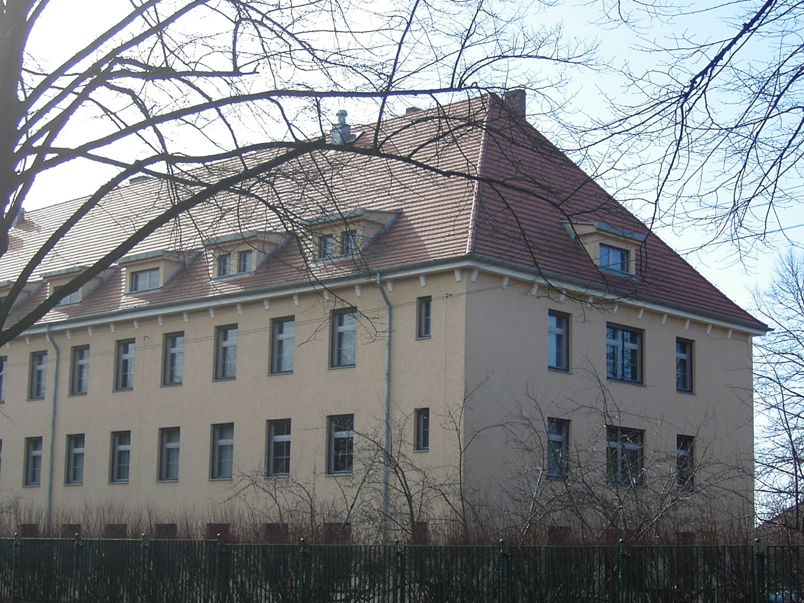 Koszary przy ul Żołnierskiej w Szczecinie; budynek nr 2 stacjonowały tu m.in: 42 (123) batalion WOP,kompania saperów